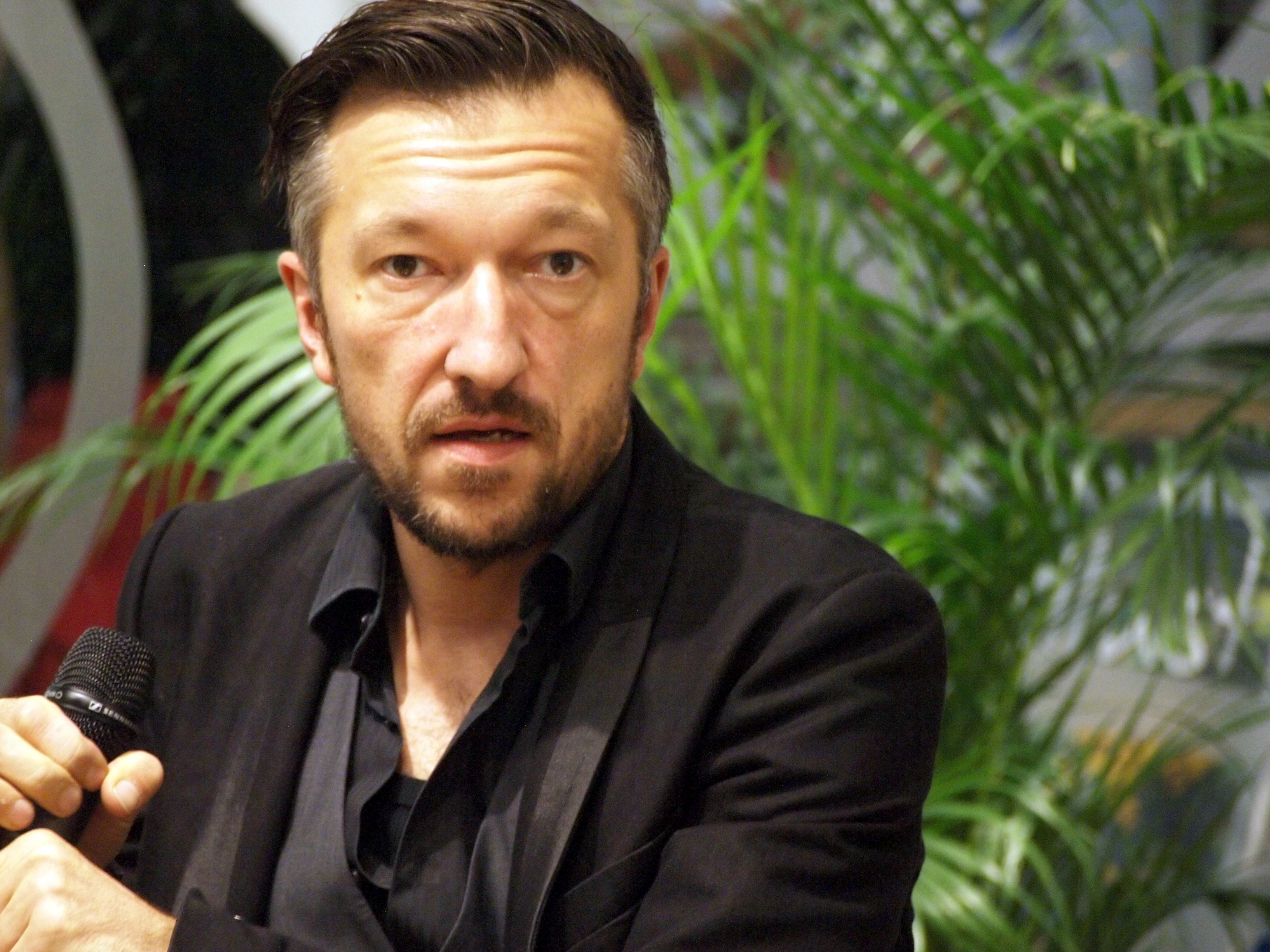 Lukas Bärfuss auf der Frankfurter Buchmesse 2014